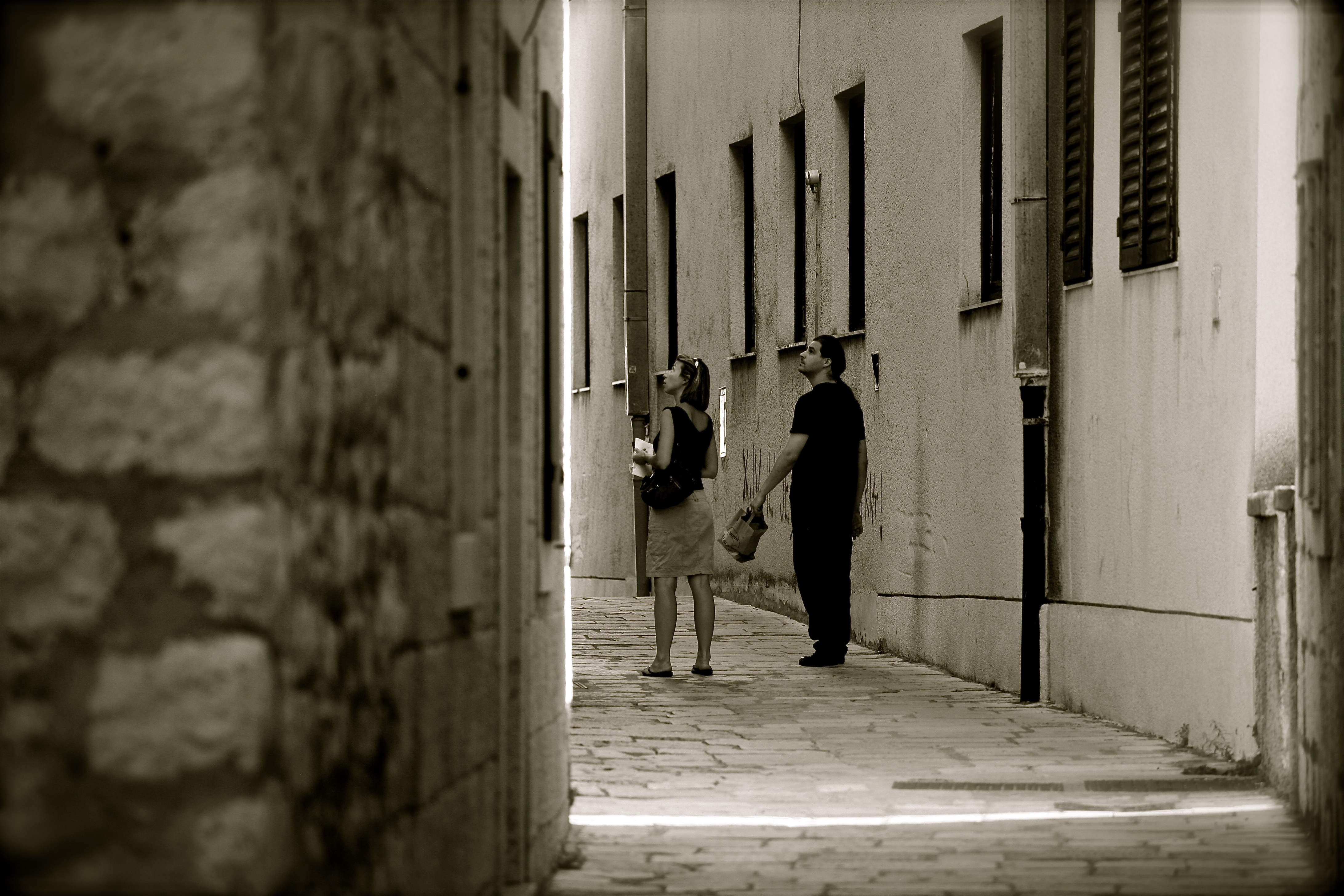 Get Lost in Korcula